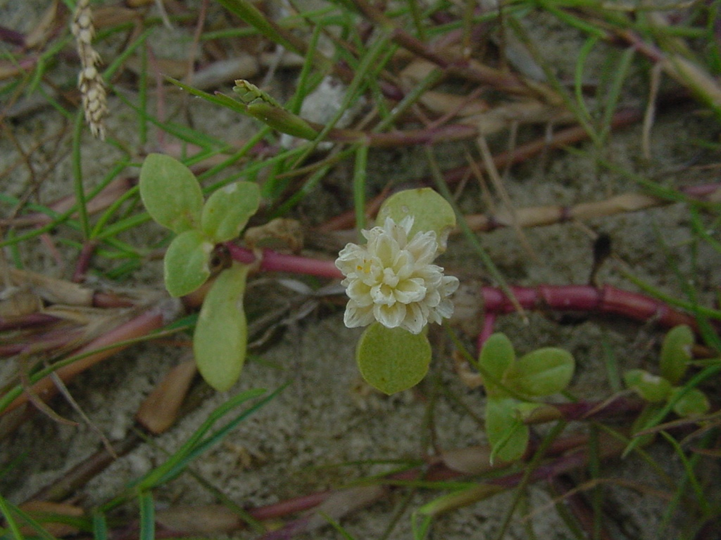 Blutaparon portulacoides - AMARANTHACEAE - Parque Nacional da Lagoa do Peixe - Tavares - RS - Brasil